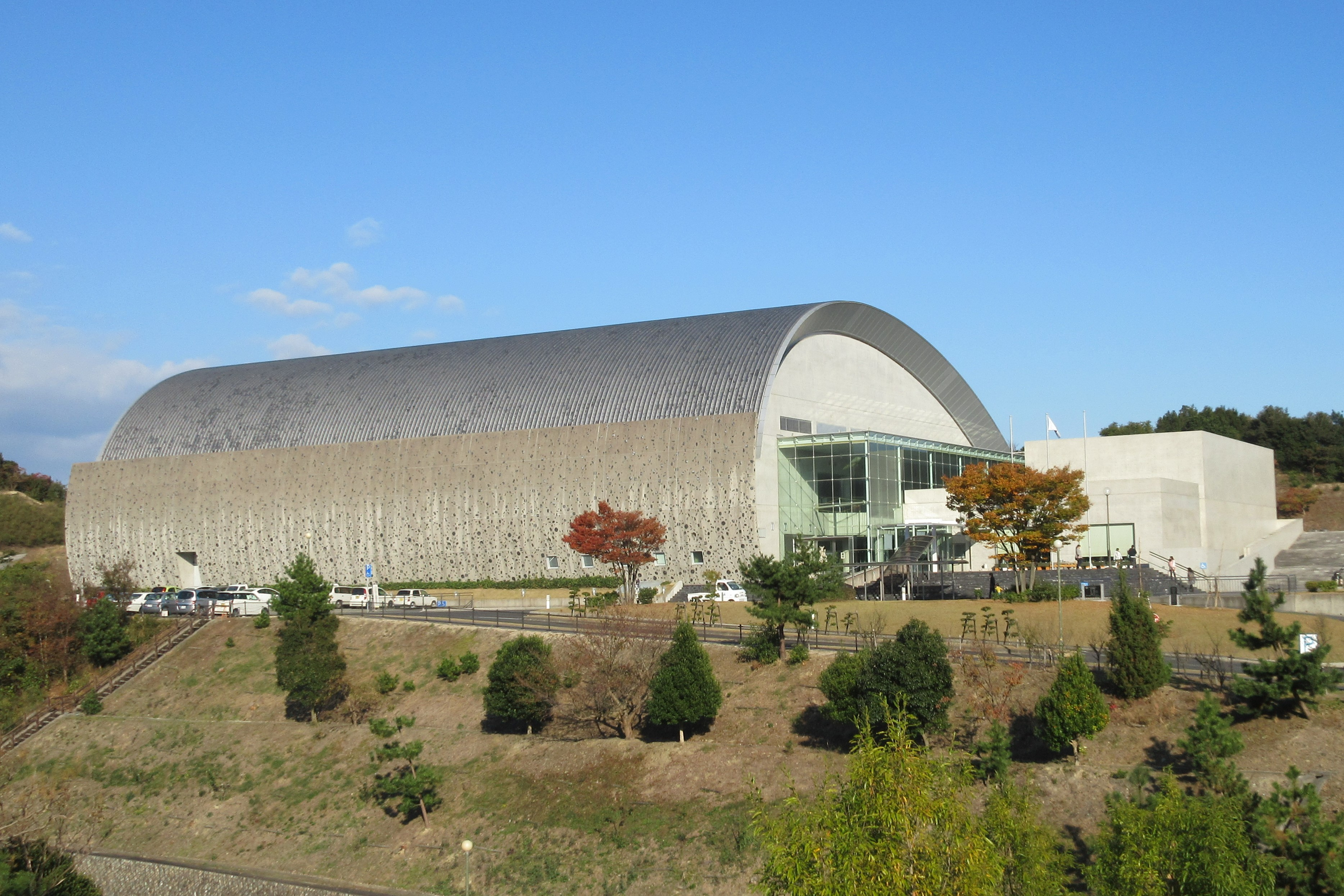 南あわじ市立文化体育館